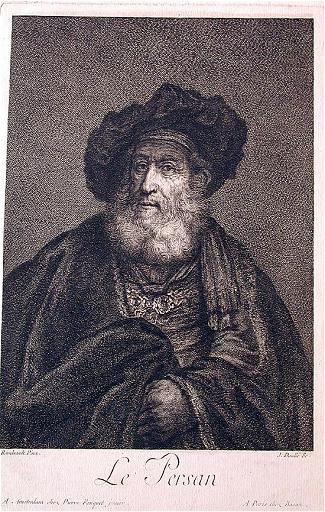 "Pärslane". Rembrandt van Rijni järgi.